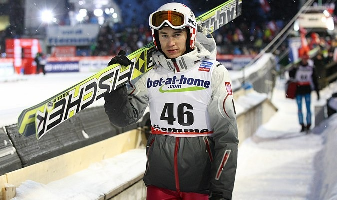 Kamil Stoch podczas konkursu indywidualnego mężczyzn na skoczni normalnej w ramach Mistrzostw Świata 2013.